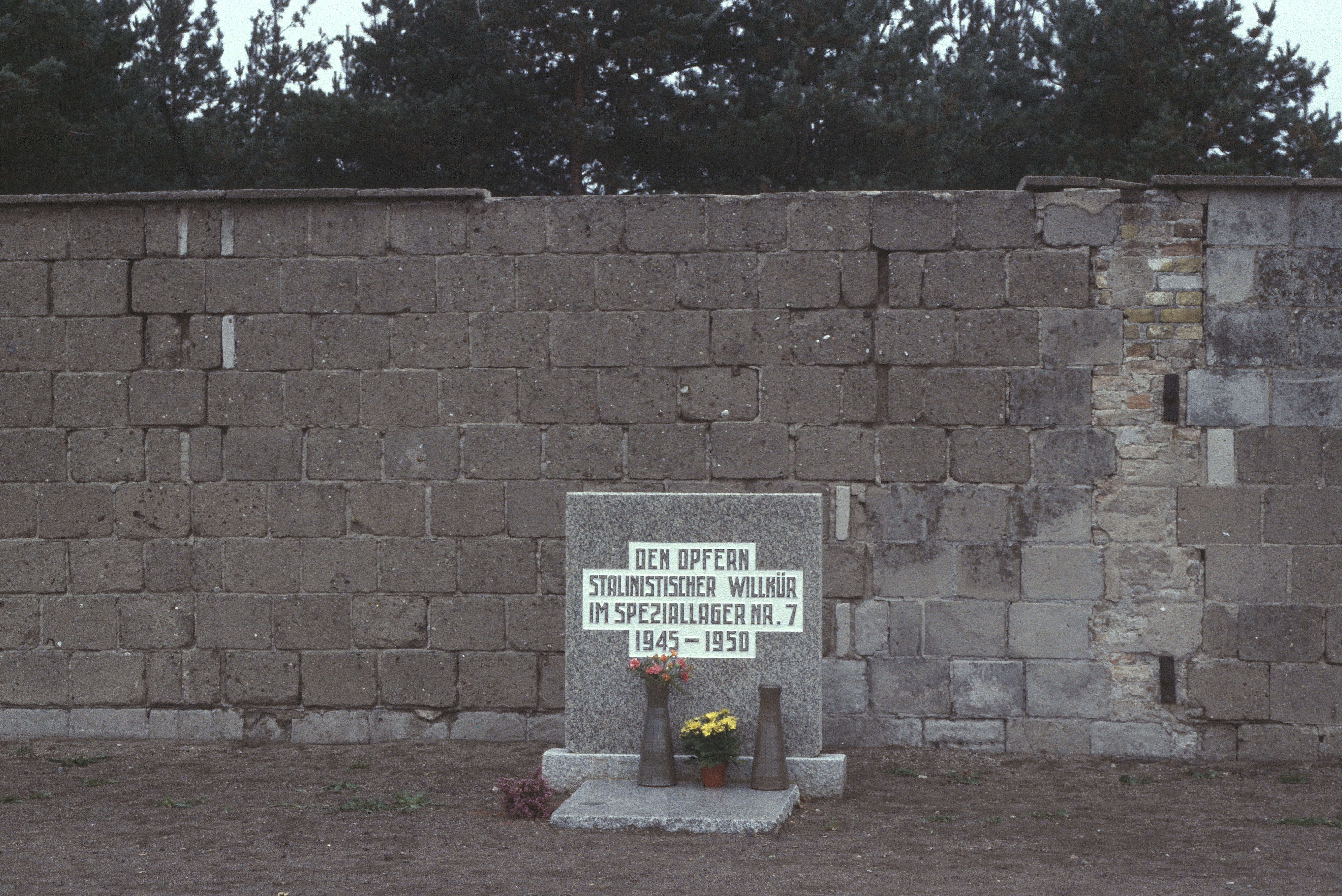 KZ Sachsenhausen